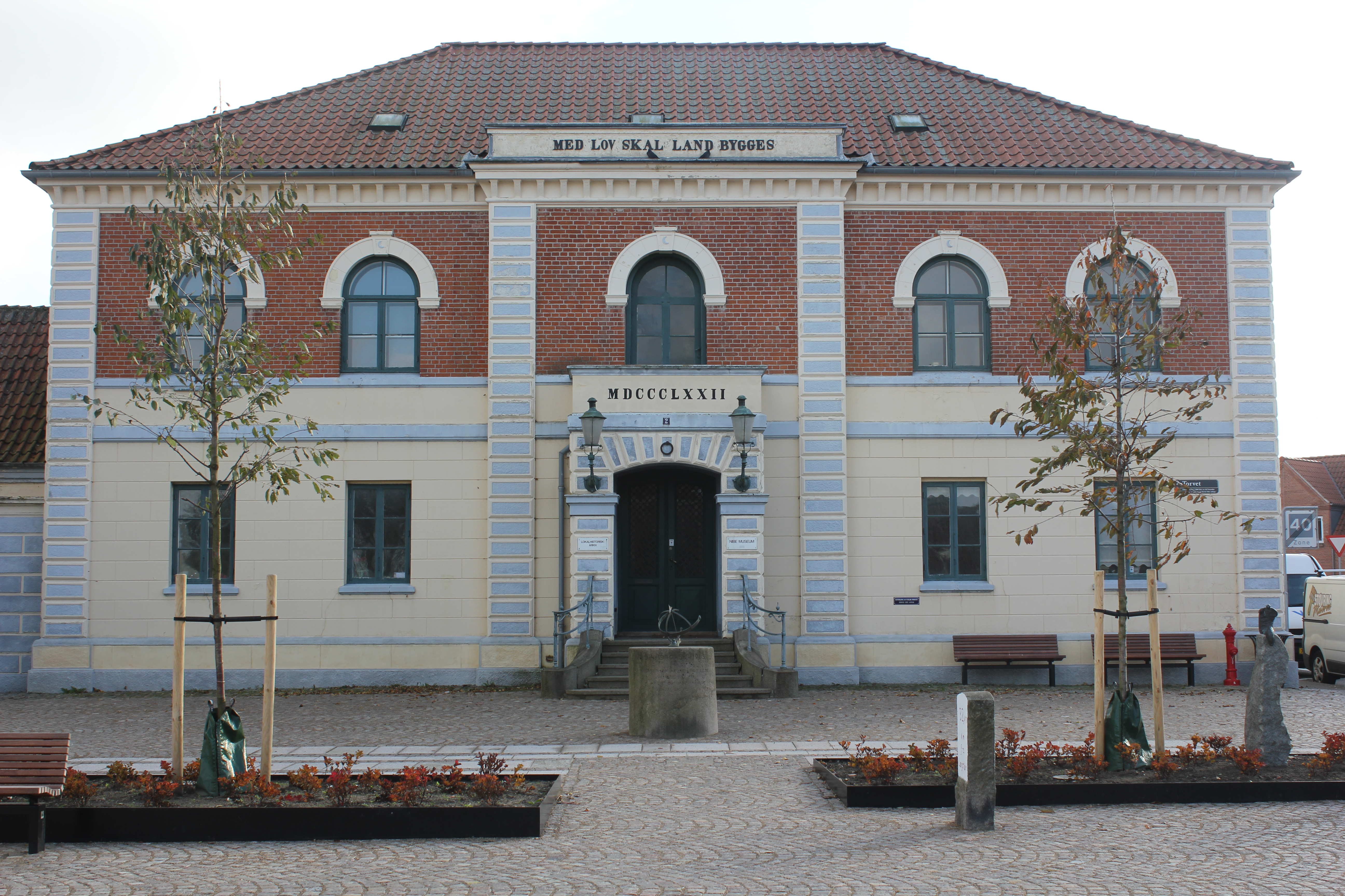 Tinghuset Nibe